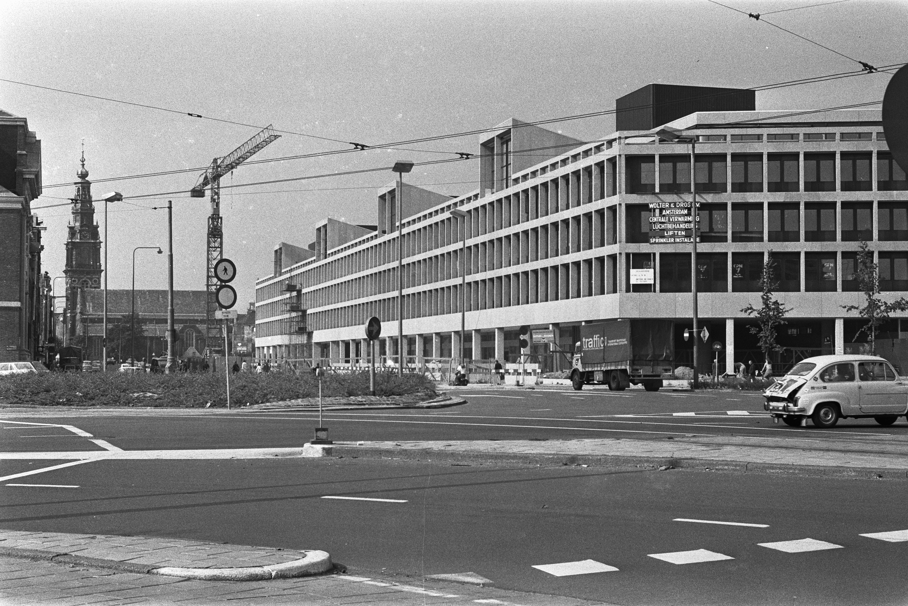 Collectie / Archief : Fotocollectie Anefo Reportage / Serie : [ onbekend ] Beschrijving : Stadsvernieuwing Amsterdam, Jodenbreestraat met links Zuiderkerk en rechts textielgrossiersverzamelcentrum in aanbouw Datum : 20 september 1971 Locatie : Amsterdam, Noord-Holland Trefwoorden : STADSVERNIEUWINGEN Instellingsnaam : Zuiderkerk Fotograaf : Punt, […] / Anefo Auteursrechthebbende : Nationaal Archief Materiaalsoort : Negatief (zwart/wit) Nummer archiefinventaris : bekijk toegang 2.24.01.05 Bestanddeelnummer : 924-9511 Reacties Geplaatst door maaike op 18 juli 2009 - 08:28. Het textielgrossiersverzamelcentrum draagt de naam Burgemeester Tellegenhuis en kreeg later als bijnaam 'maupoleum'. (architect Piet Zanstra; gebouw gesloopt in 1994) Geplaatst door Jasper op 11 maart 2013 - 17:42. Het gebouw droeg een groot deel van zijn bestaan de ondertitel 'lelijkste gebouw van Nederland'. Want: te modern, te groot en op de verkeerde plek gesitueerd. Bovendien vertegenwoordigde het pand de zogeheten cityvorming en de protagonisten daarvan: de gevestigde gemeentelijke orde, die men ervoor hield zonder pardon haar stadsvernieuwingsplannen door te drukken, ten koste van de oude, vaak kleinschaliger bebouwing. Het Maupoleum werd opgeleverd toen de haat tegen de cityvorming zo ongeveer op zijn hoogtepunt was. Het was het aangrijpingspunt voor de tegenbeweging: de stadsvernieuwing. Die heeft Amsterdam veel goeds gebracht (terugbouwen Nieuwmarktbuurt), maar ook veel narigheid ('de Nieuwe Truttigheid', zoals de referentie aan de toen populaire bouwstijl al gauw werd).